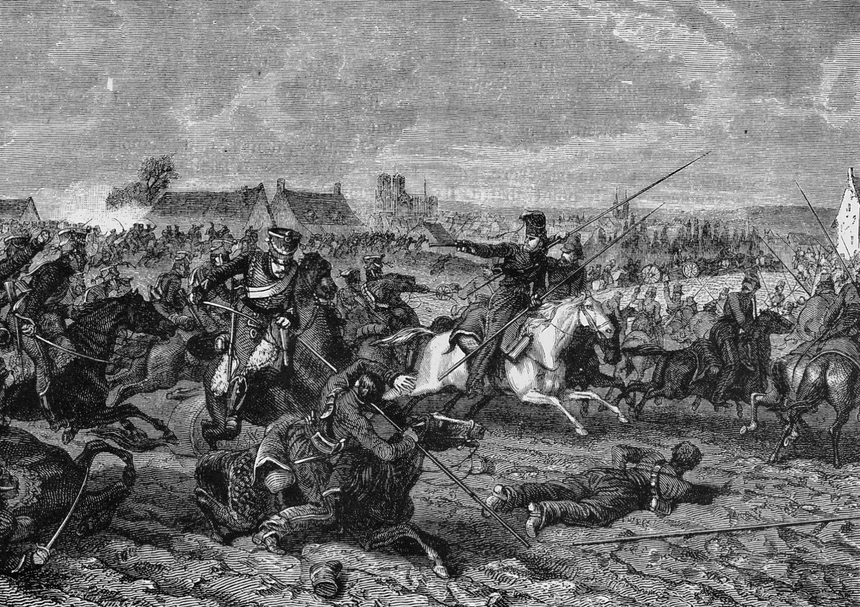 Les gardes d'honneur au combat de Reims, le 13 mars 1814. Alors que les Russes résistent encore dans le faubourg de Vesle, Napoléon envoie le 3e régiment de gardes d'honneur, commandé par le colonel-major Belmont-Briançon, pour décider de la victoire. Conduits par le général de Ségur, les cavaliers français culbutent tout d'abord les dragons russes qui tentaient de s'opposer, puis entrent dans le faubourg et engagent le combat contre les grenadiers du régiment de Riazan. L'affrontement est intense, le colonel Belmont-Briançon est tué et le général de Ségur tombe blessé à ses côtés. Les gardes d'honneur s'emparent d'une batterie d'artillerie et libèrent finalement le faubourg après l'arrivée des cuirassiers de Bordesoulle et de la cavalerie de la Garde. Napoléon leur octroie l'honneur d'entrer les premiers dans la ville de Reims évacuée par les coalisés. Au fond sont visibles les tours de la catéhdrale de Reims et la basilique st-Remi.